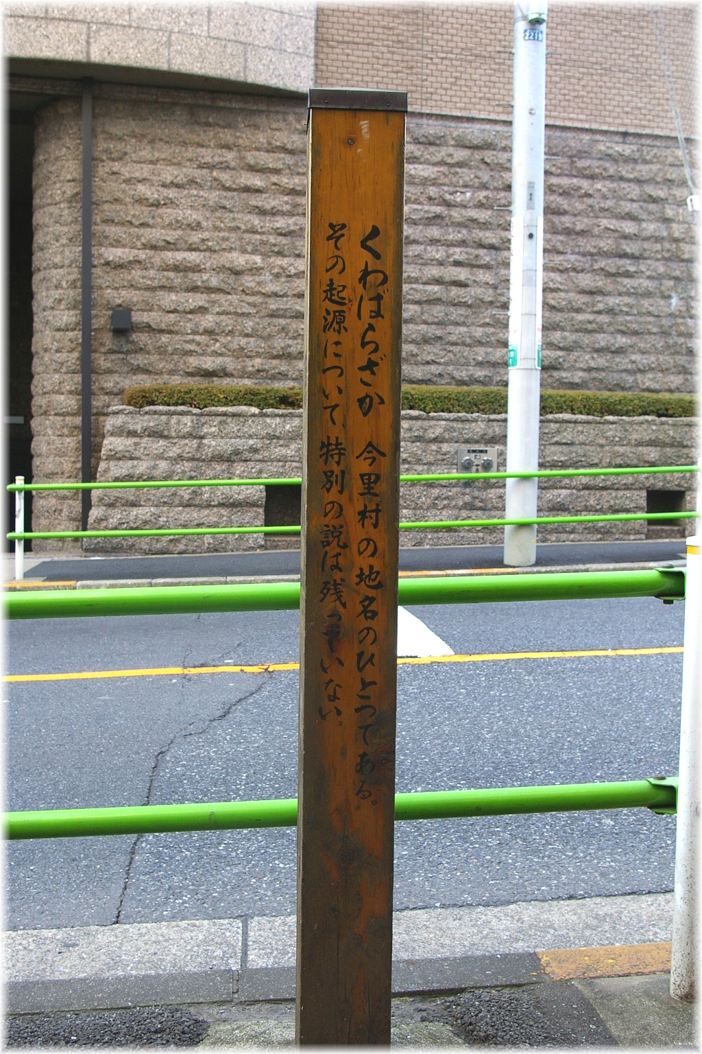 Ich machte dieses Foto von mir in 2006.